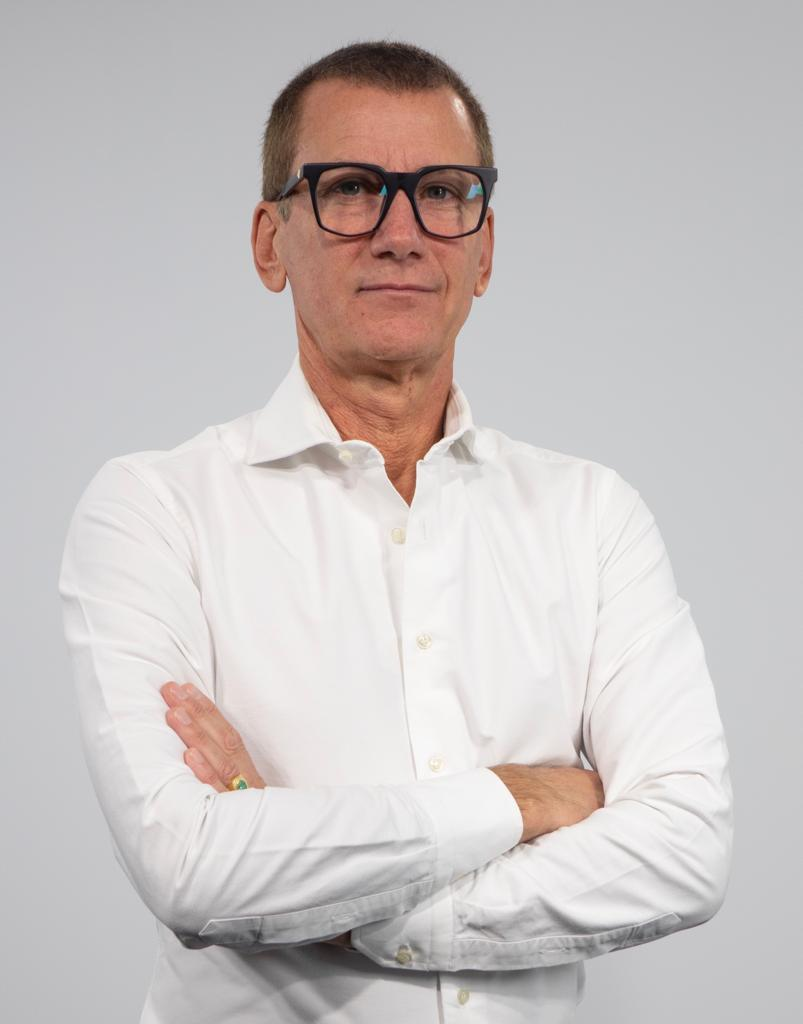 Il Professor Marco Lanzetta